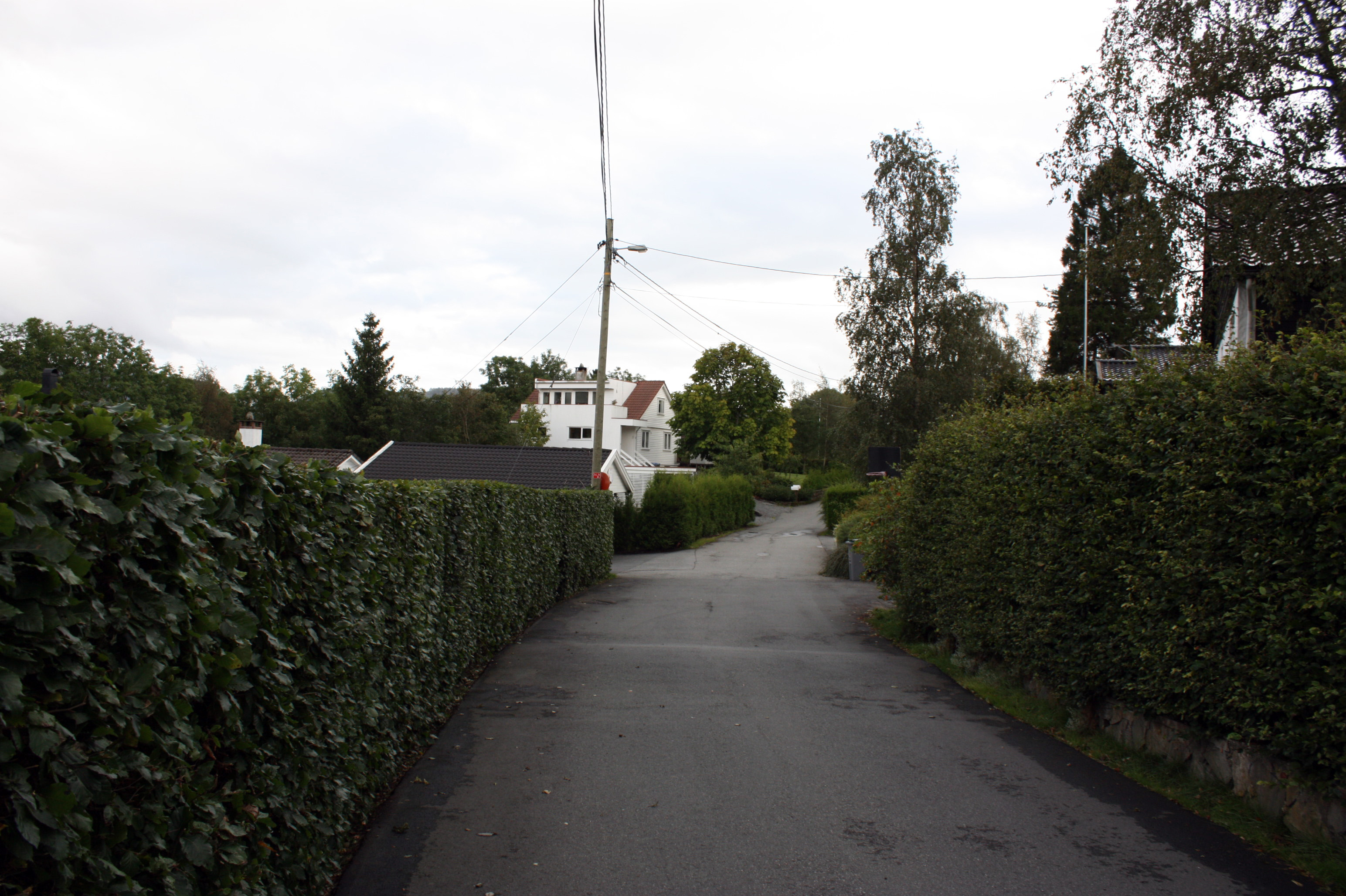 Venåsen, Fana, Bergen.